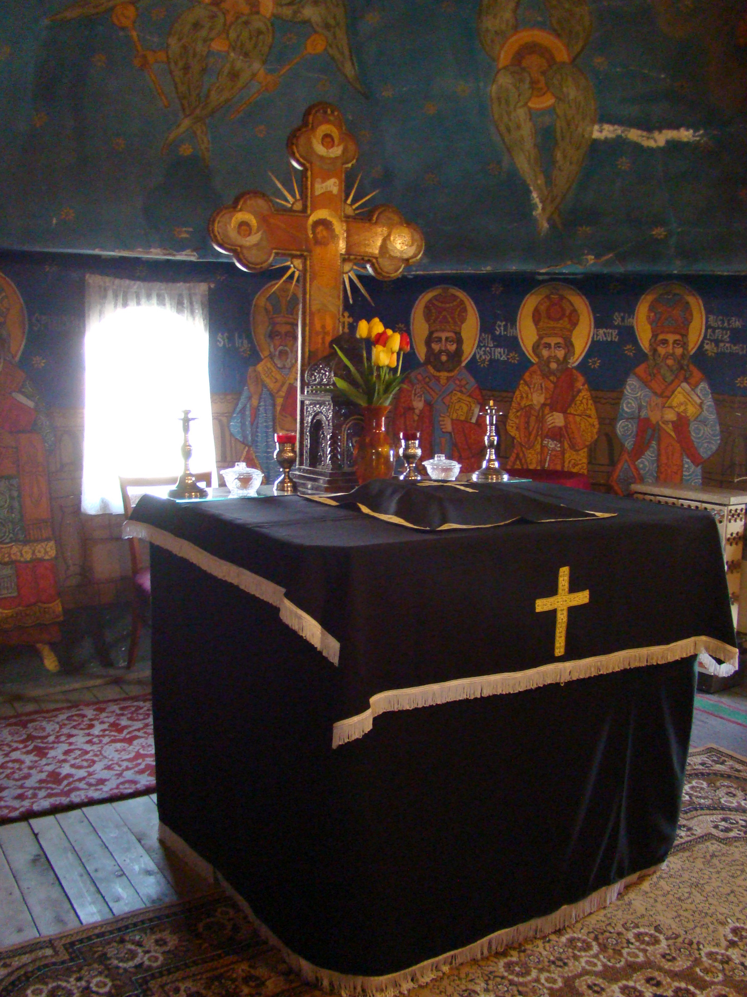 Biserica de lemn, sat aparţinător SFÂNTU GHEORGHE; oraş IERNUT